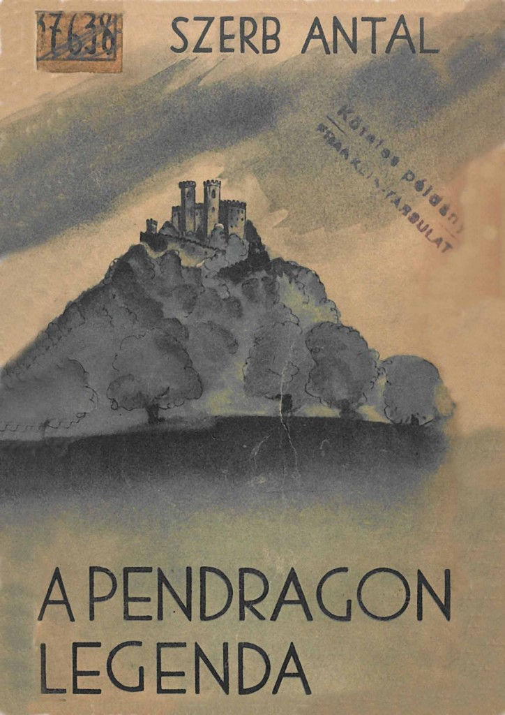 A Pendragon legenda című regény első kiadásának borítója.